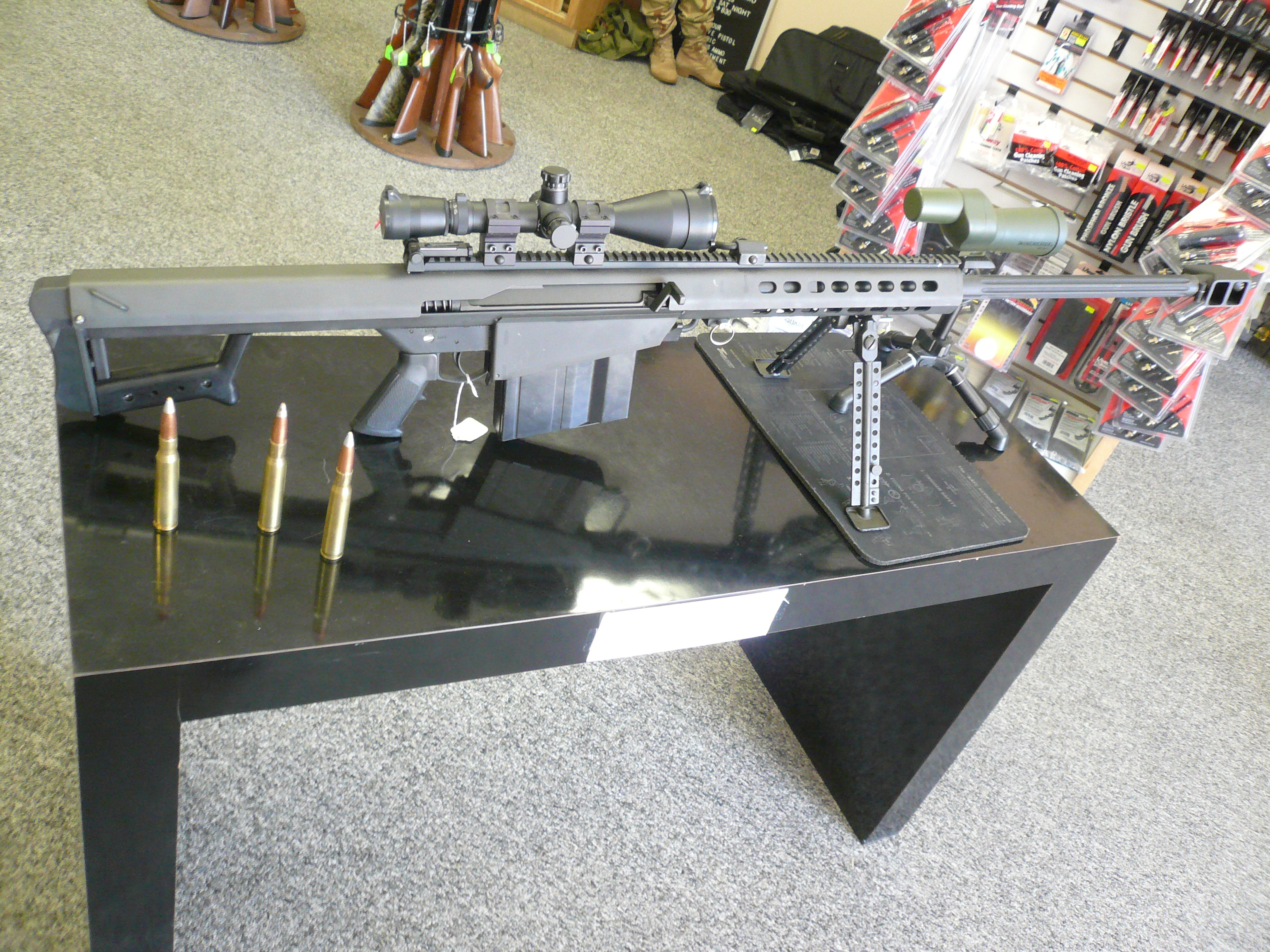 M82 Sniper rifle